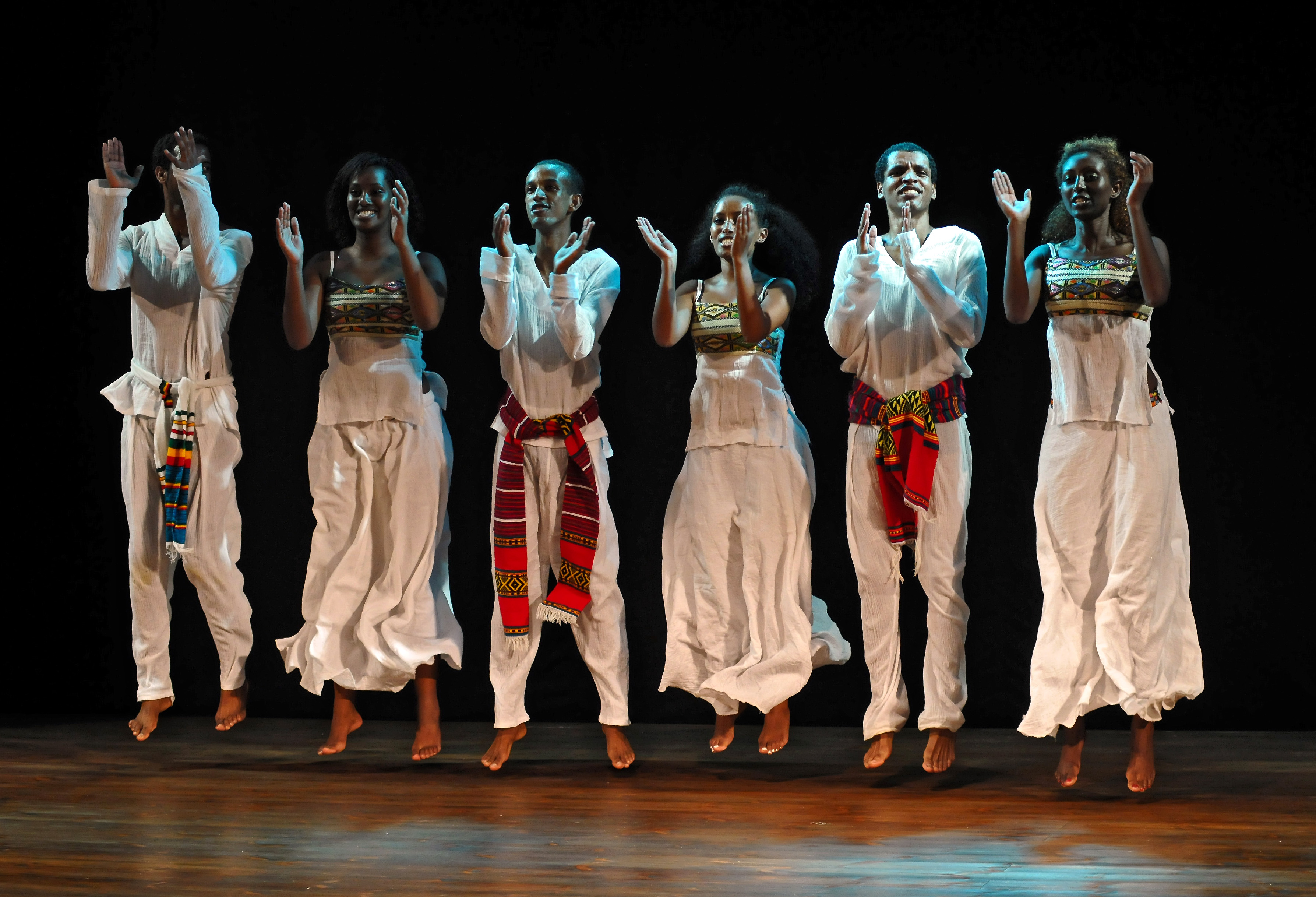 רות אשל היא רקדנית, חוקרת מחול, כוריאוגרפית ומבקרת מחול . ריקודי כתפיים, להקת ביתא (2008), כוריאוגרפיה - רות אשל, צילום - עופר זבולון